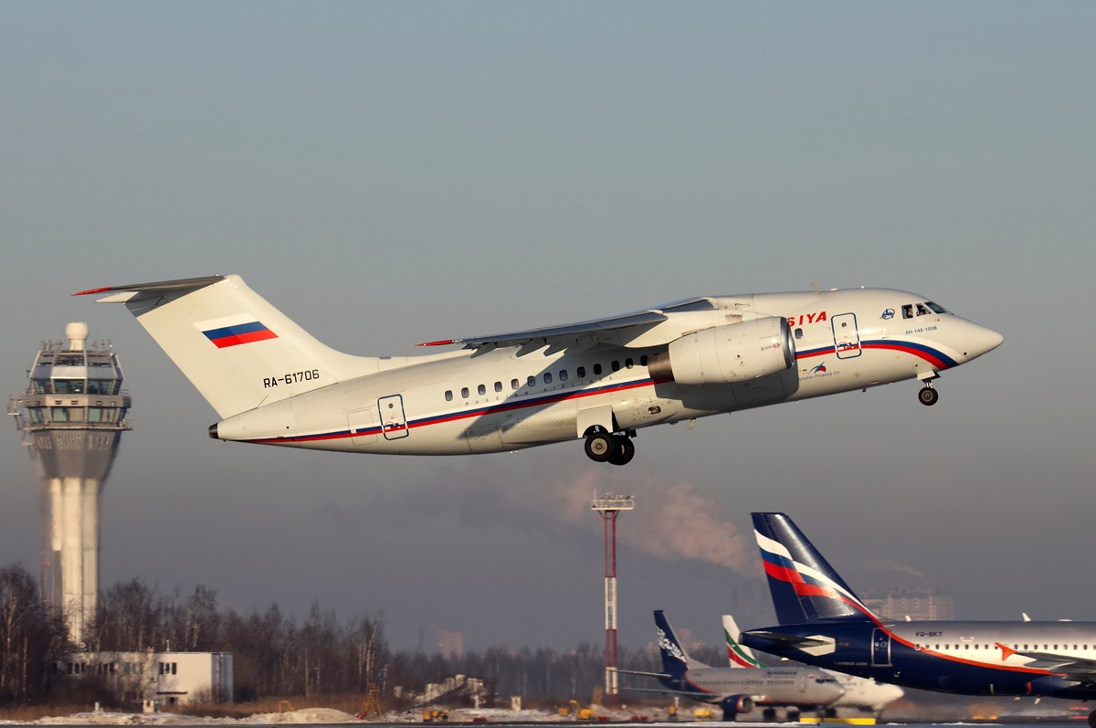 Rossiya Antonov An-148-100B